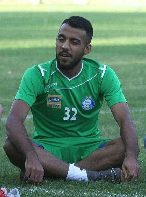 تصاویر تمرین استقلال پس از برد در جام حذفی مقابل گل ریحان